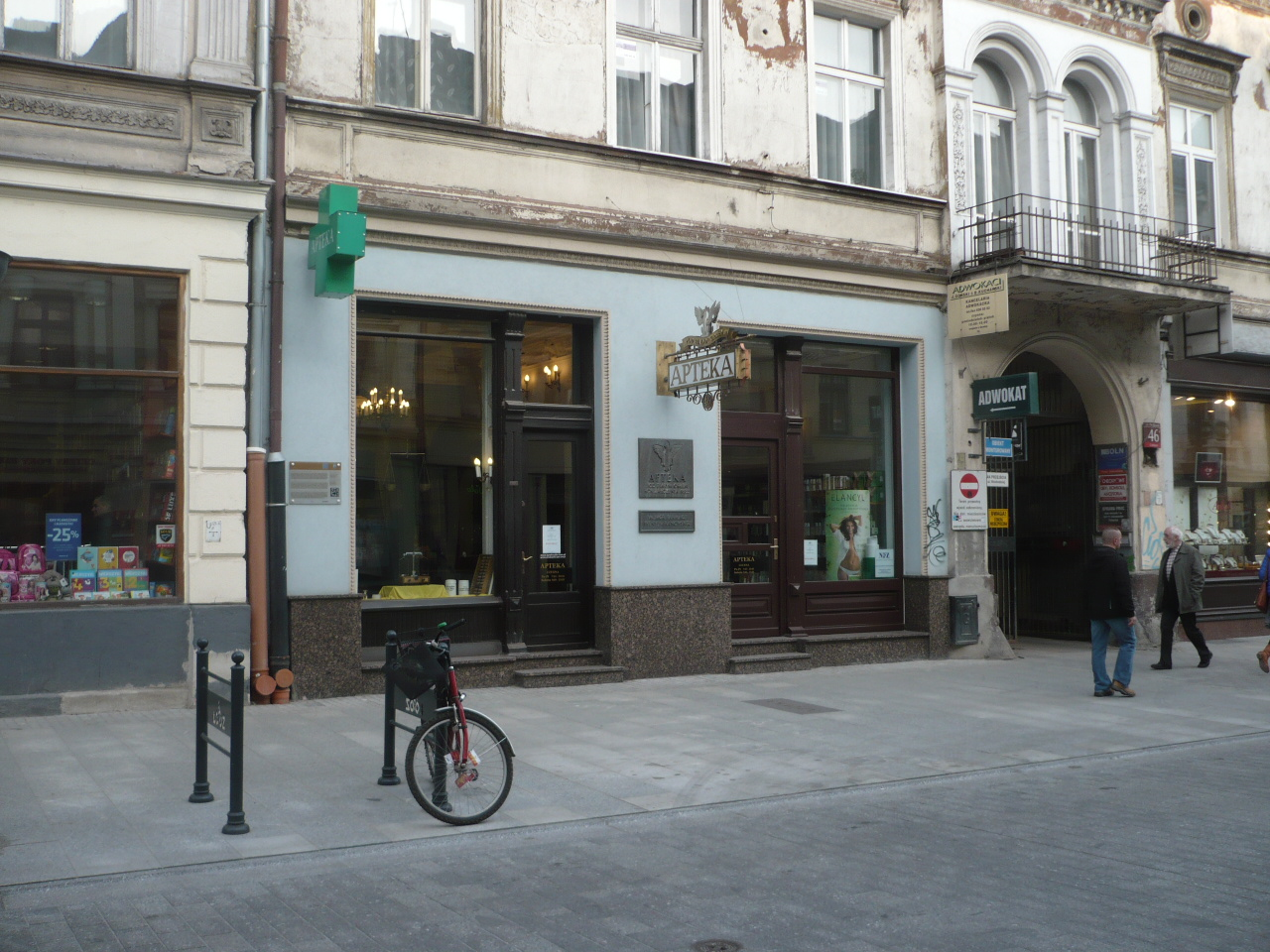 Łódź, ul. Piotrkowska 46, apteka Maurycego Spokornego w latach 1884-1890.